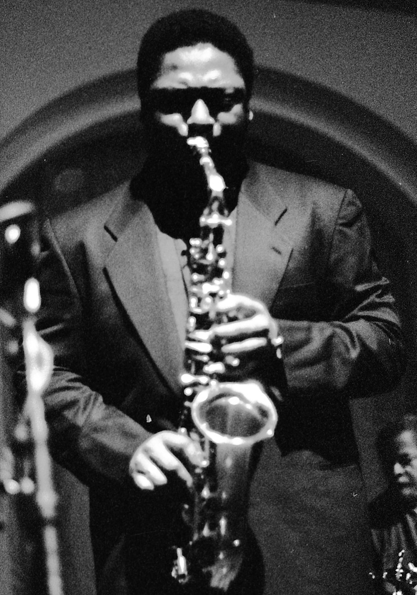 Vincent Herring mit dem Nat Adderley Quintett, 25.02.1993, Braunschweig